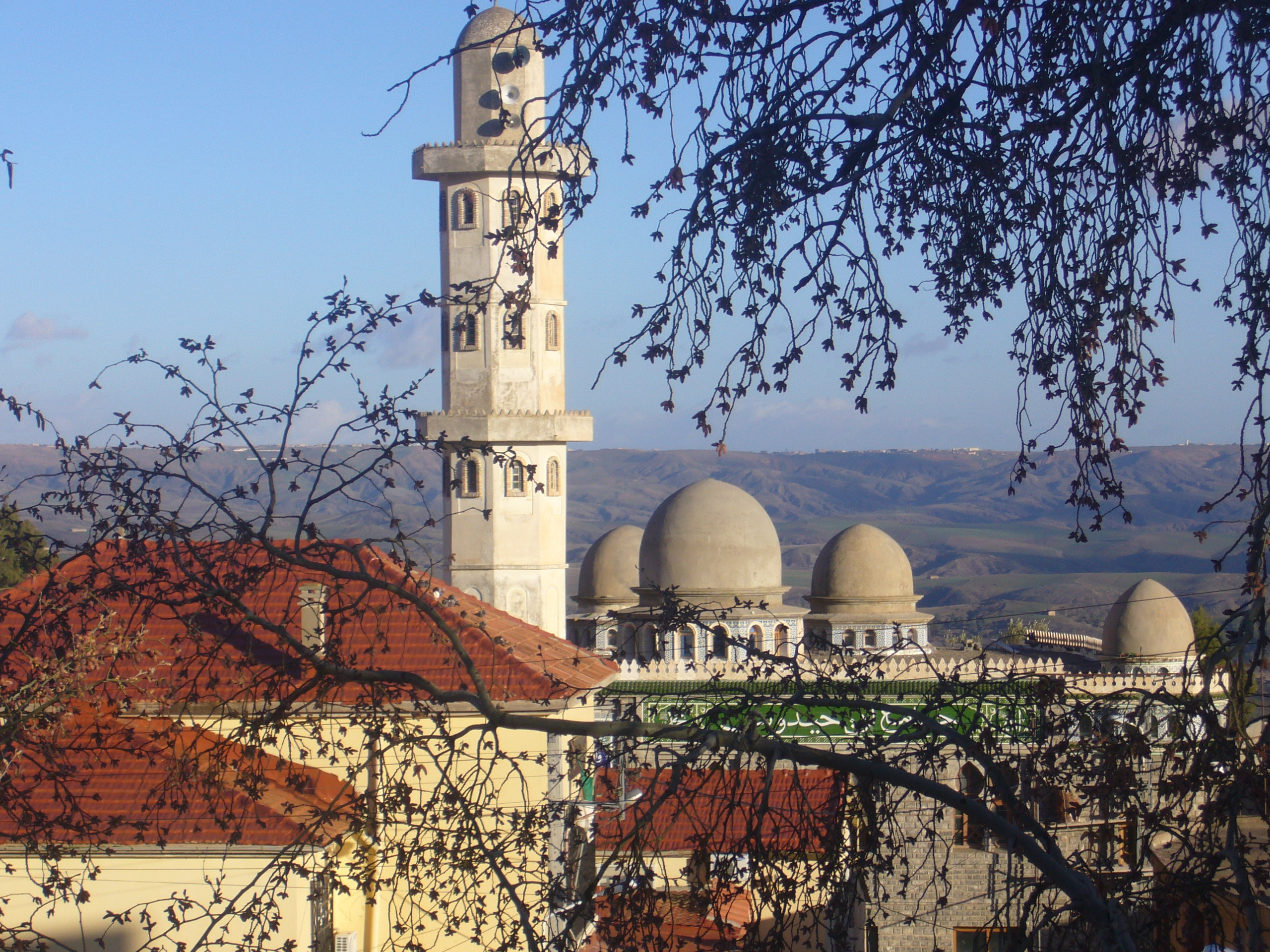 Minaret de la mosquée Ben Hidouss (ou Bouhoudous) à Bordj Zemoura en Kabylie (Bordj Bou Arréridj, Algérie).